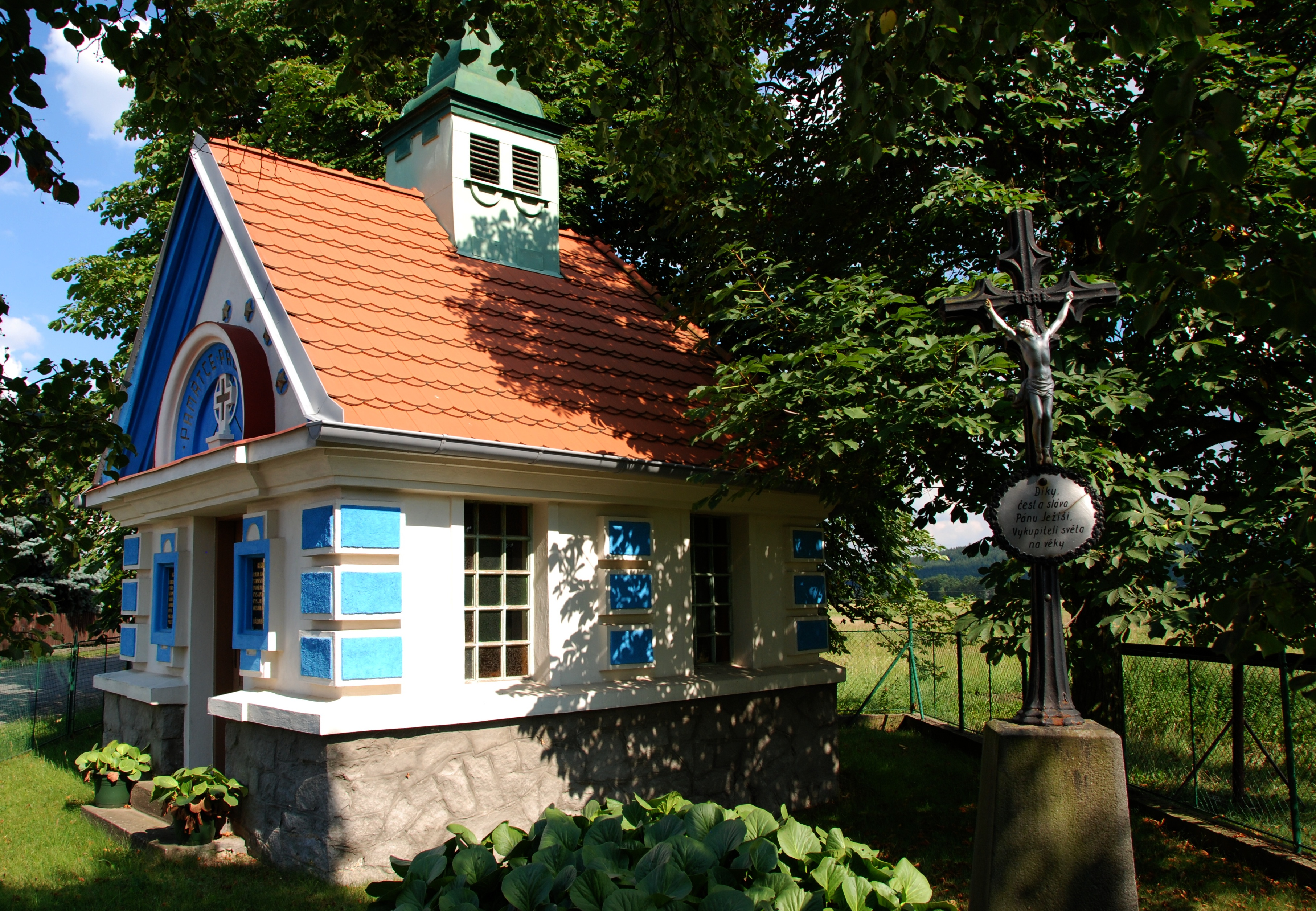 Kaple Nanebevzetí Panny Marie u vesnice Budínek. Kaple stojí v katastrálním území Rybníky.